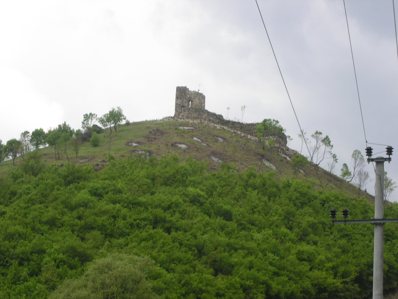 Kalaja e Pogragjës, Anamoravë, Kosovë